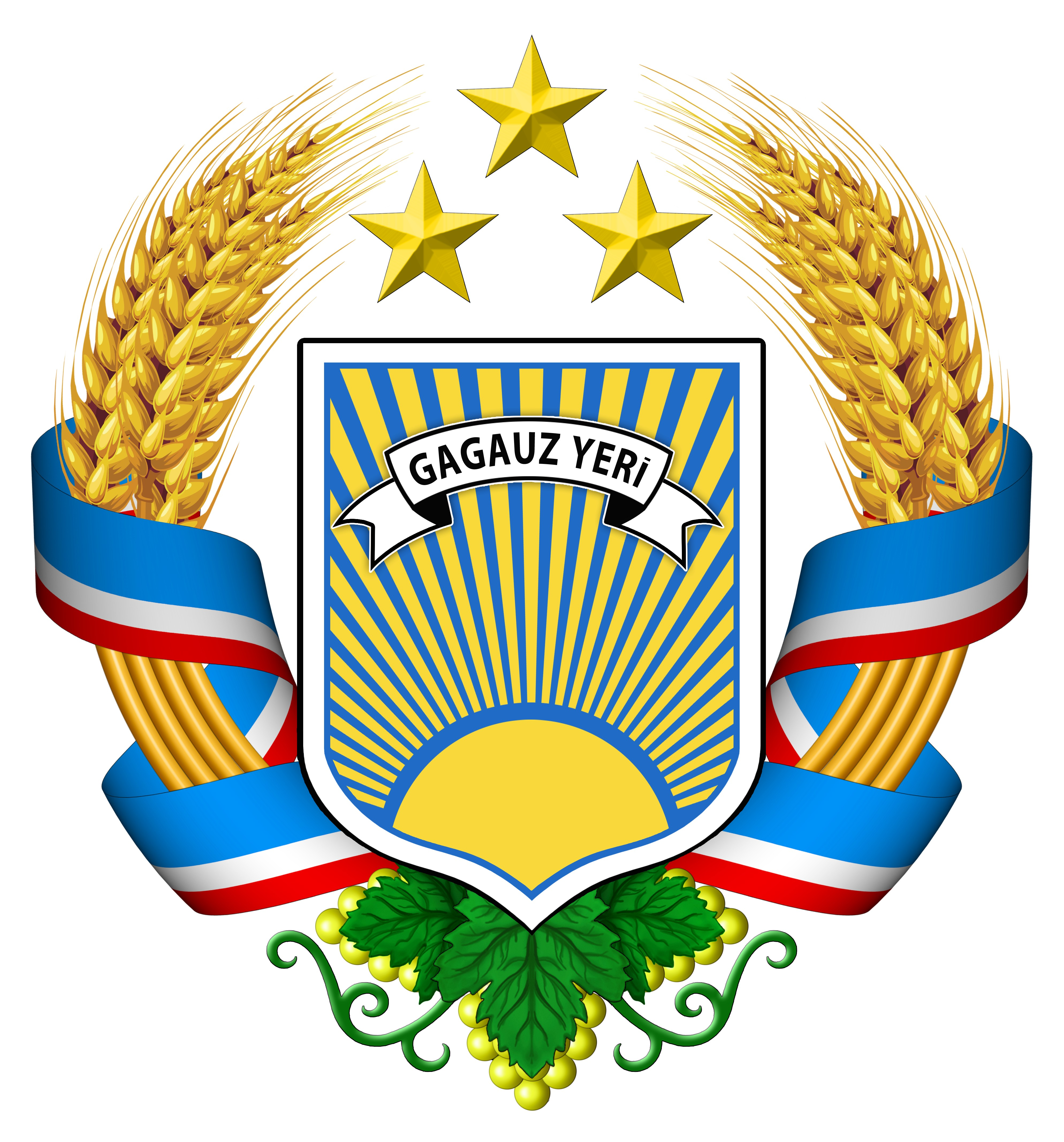 Герб Гагаузии